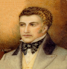 Gaspar de Santa Coloma. Miniature by Luis Vernet.